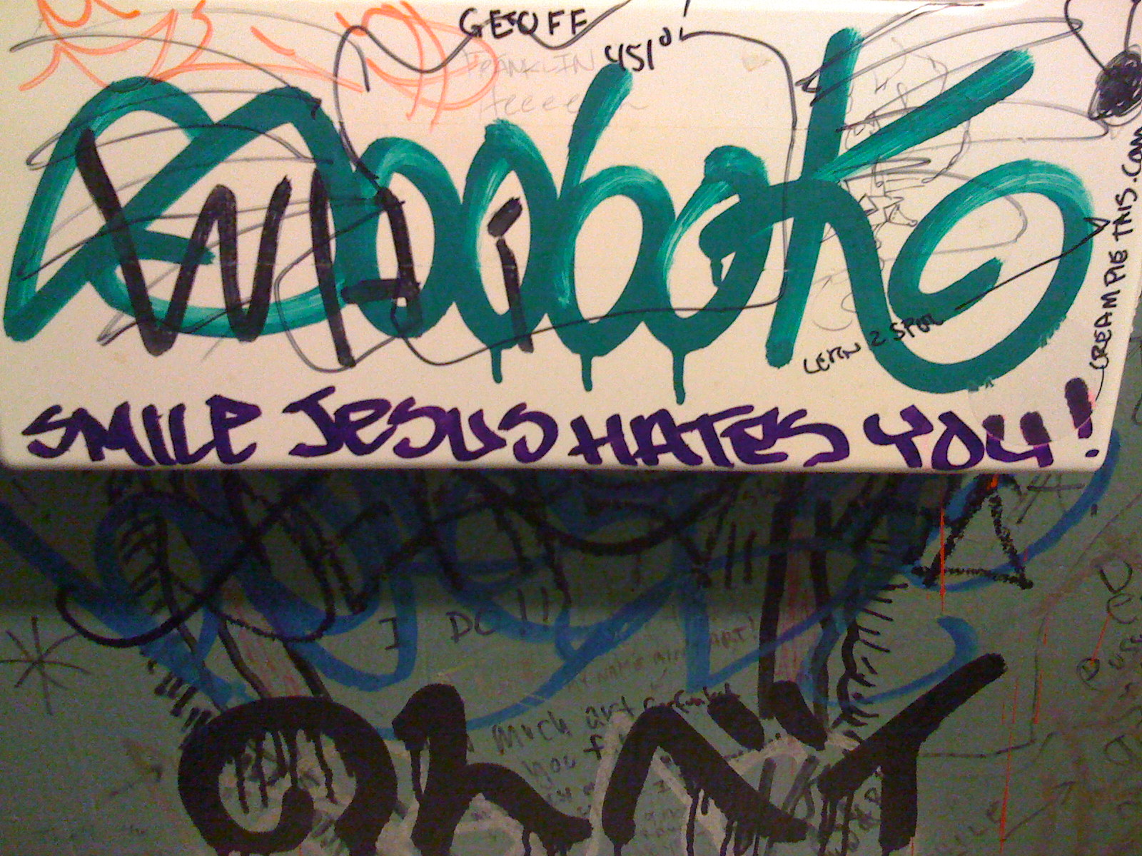 Anti-Christian graffiti in San Francisco, California